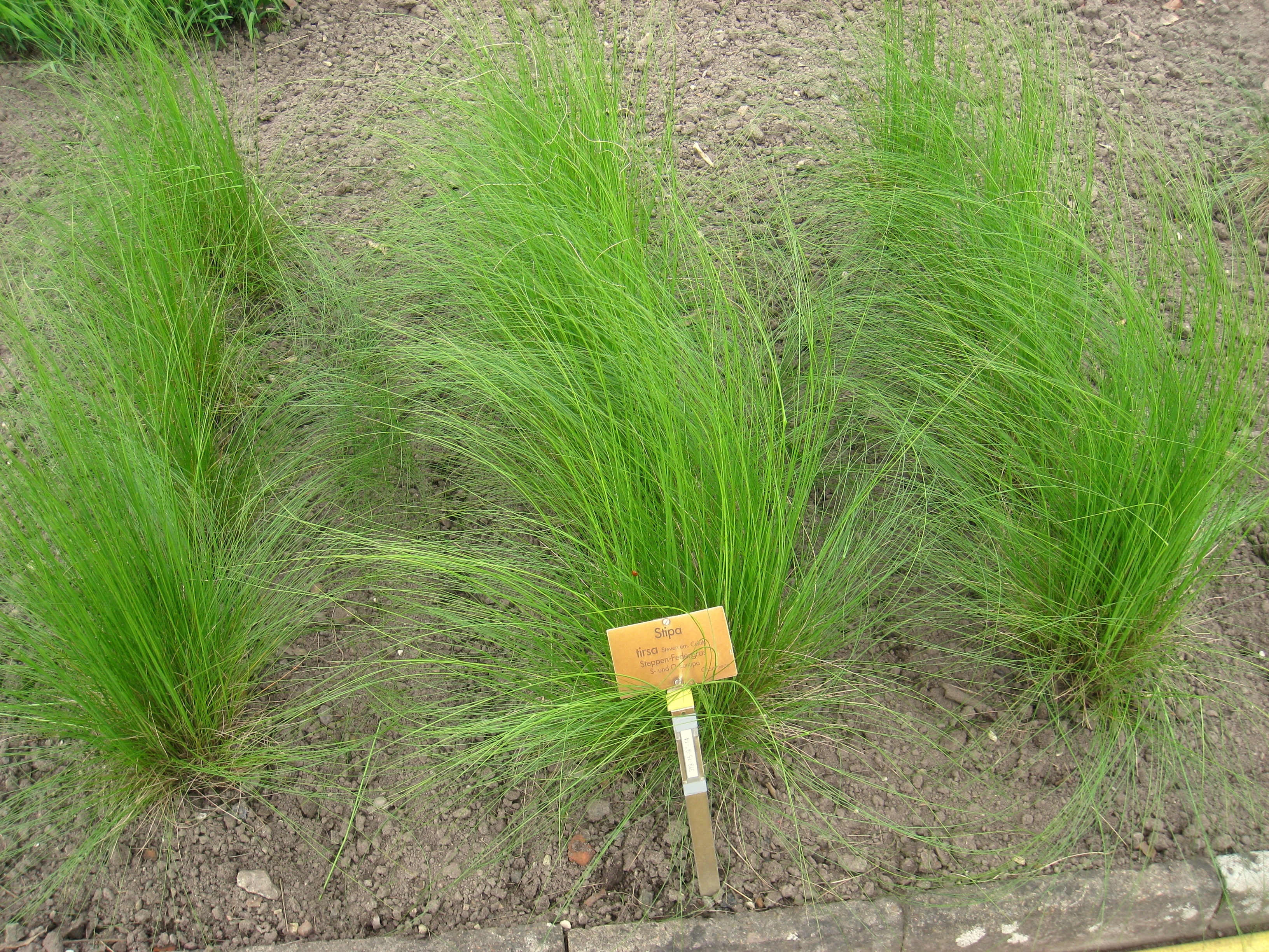 Stipa tirsa specimen in the Botanischer Garten, Berlin-Dahlem (Berlin Botanical Garden), Berlin, Germany.